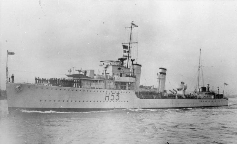 British destroyer HMS DAINTY underway.